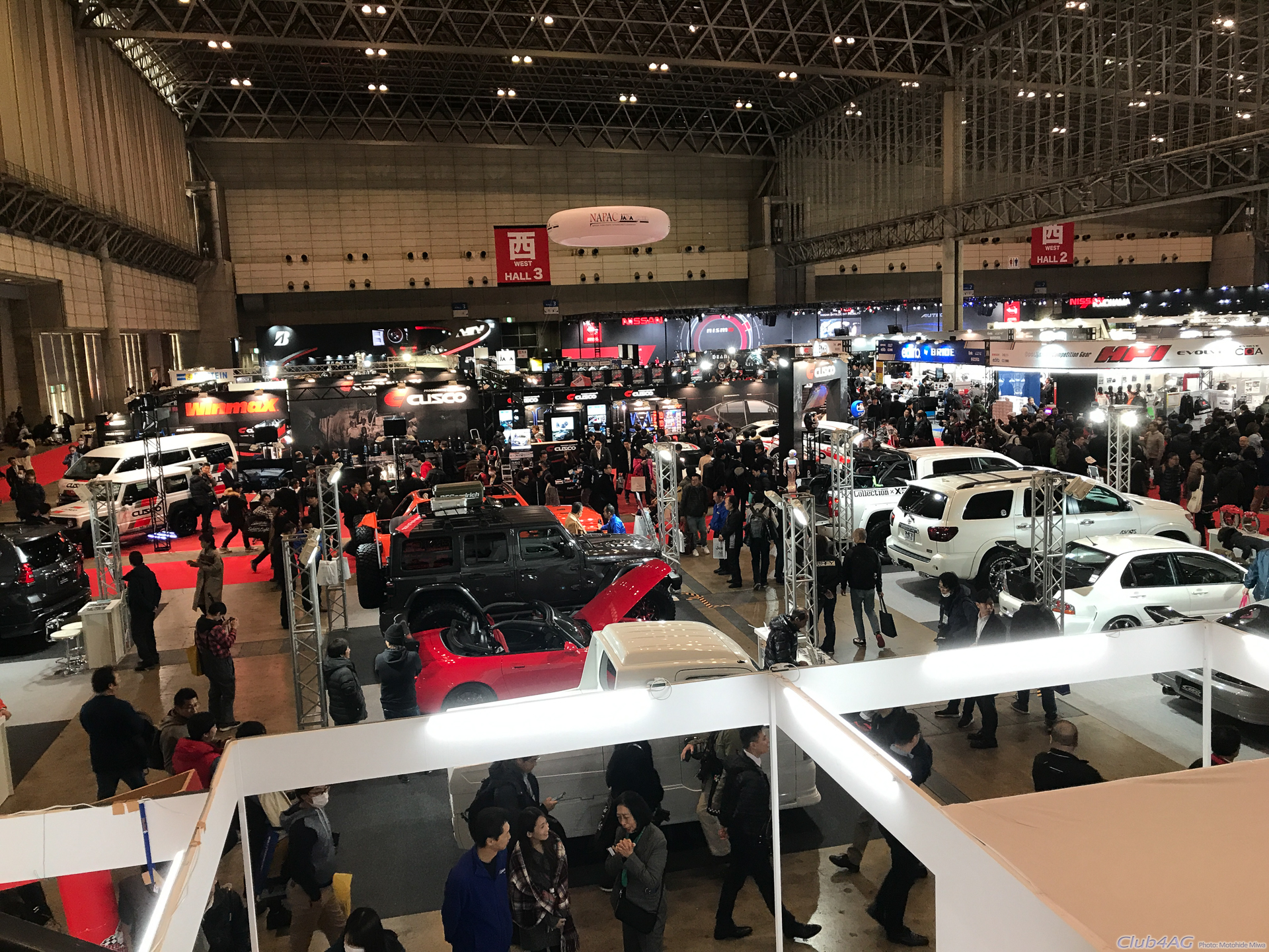 Tokyo Auto Salon 2019